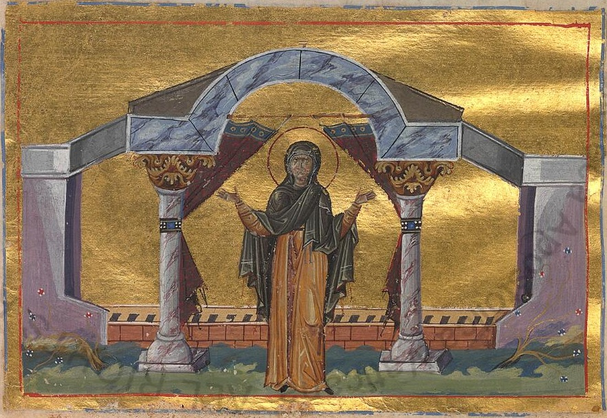 Мариамна (сестра апостола Филиппа). Константинополь. 985 г. Миниатюра Минология Василия II. Ватиканская библиотека. Рим.